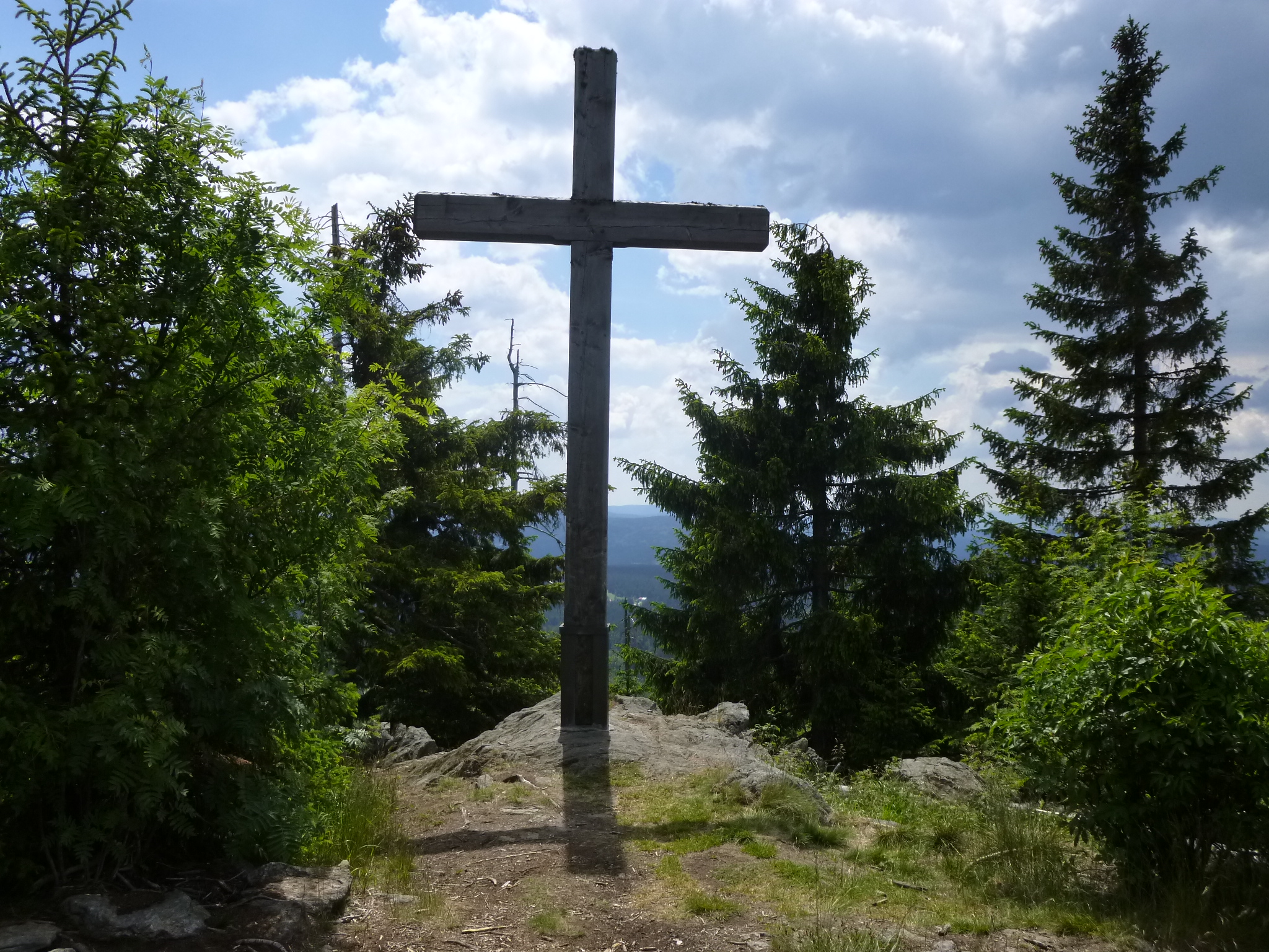 Gipfelkreuz auf dem 1263 m hohen Siebensteinkopf, unweit der Tschechischen Grenze im Nationalpark Bayerischer Wald bei Finsterau